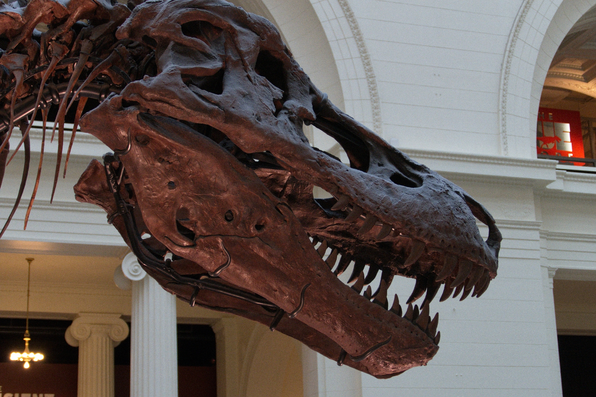 T-rex "Sue im Fields Museum of Natural History, Chicago